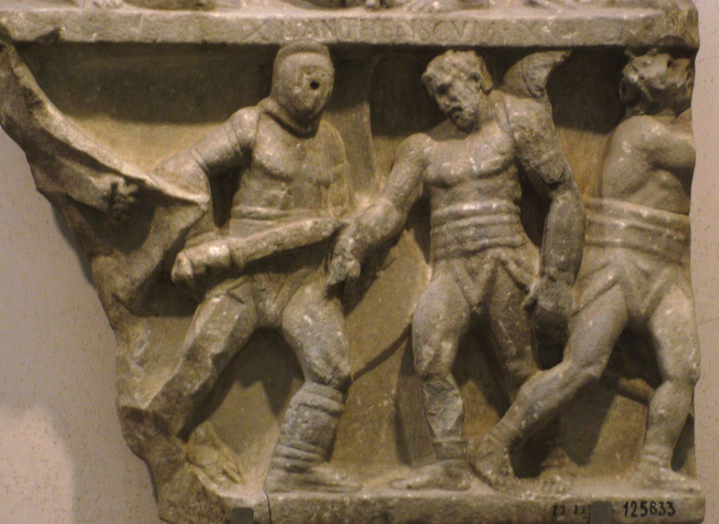 Etruszk fríz-részlet (Etruszk Nemzeti Múzeum, Róma)